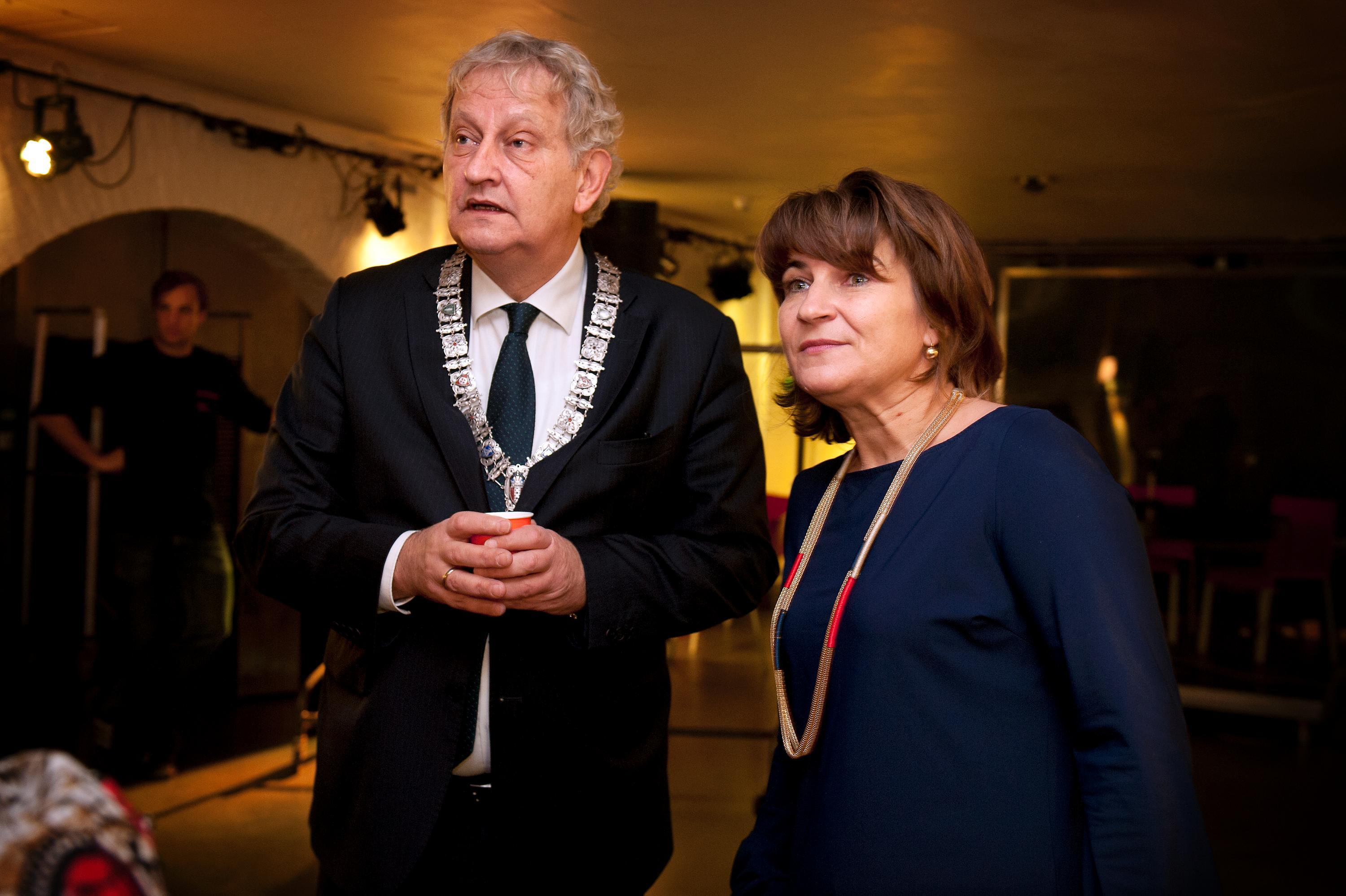 Minister Lilianne Ploumen en Burgemeester Eberhard van der Laan tijdens toespraak bij de Afrikadag 2012